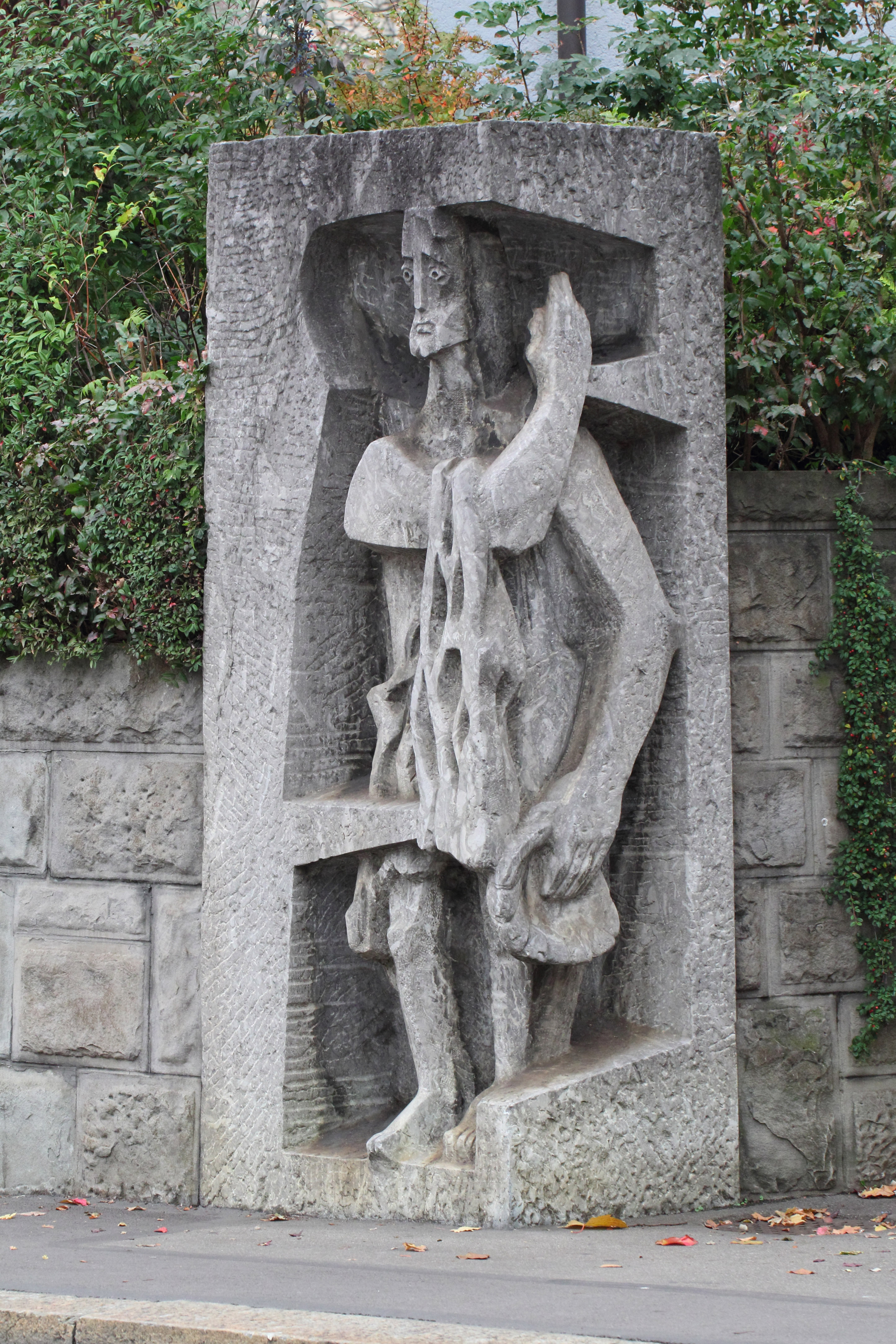 Römisch-katholische Pfarrkirche Liebfrauen Zürich, Skulptur von Albert Schilling an der Ecke Leonhard-/Weinbergstrasse